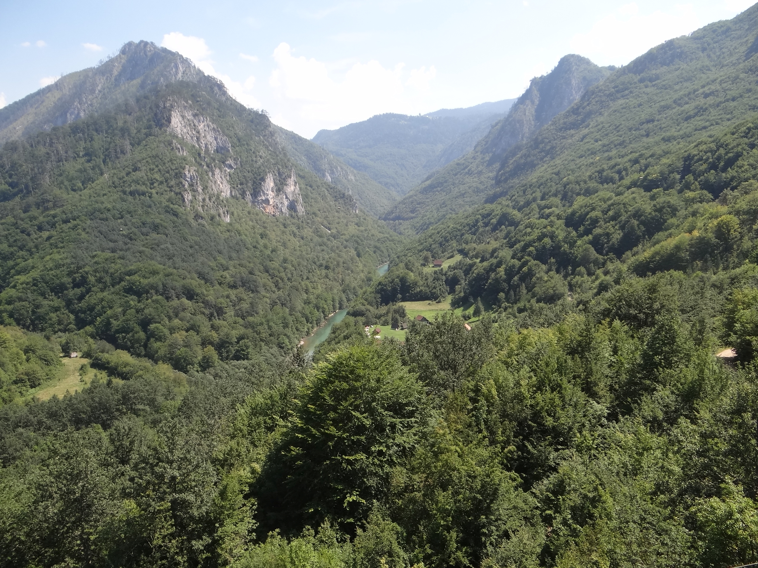 Rzeka Tara w Czarnogórze